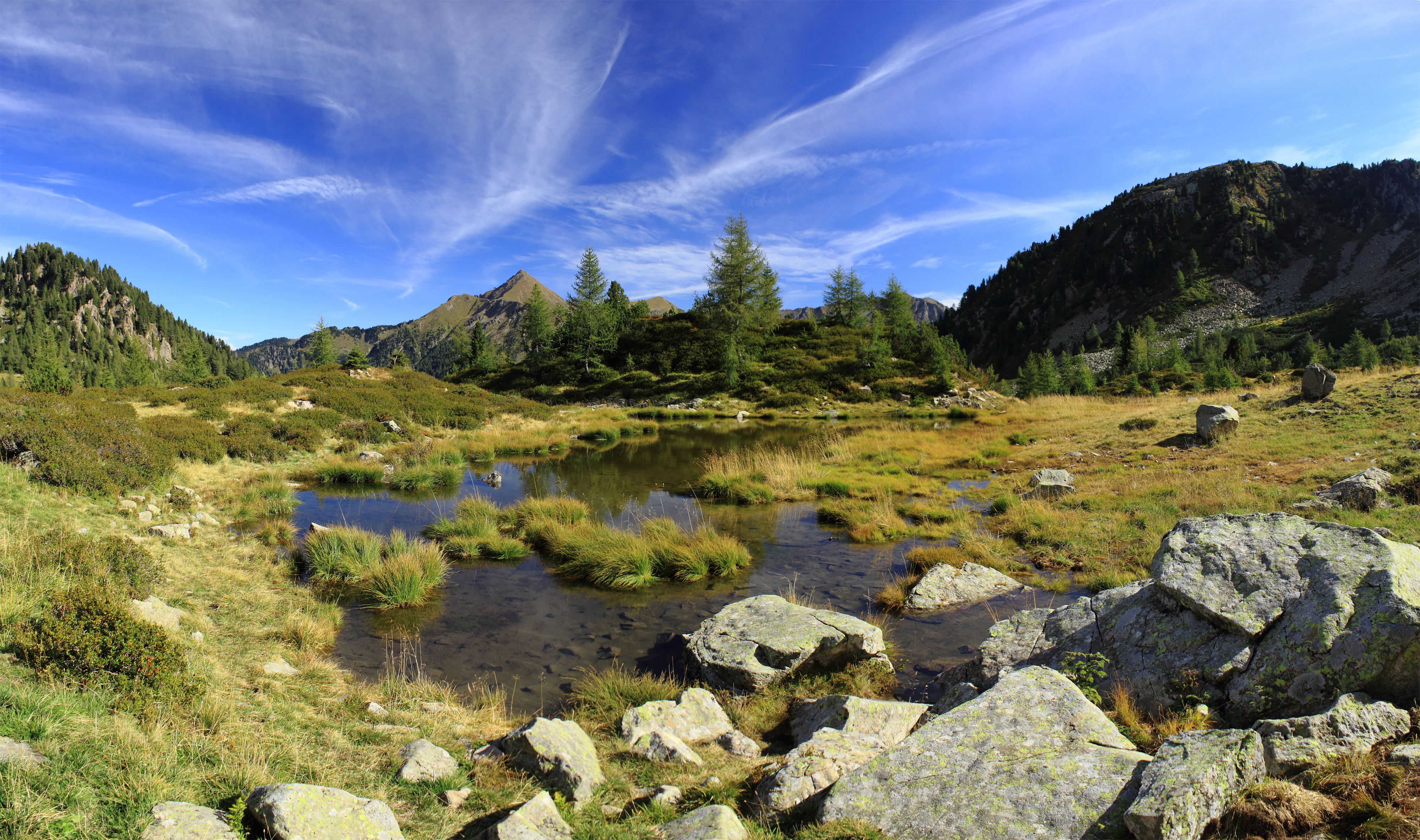 Laghetto dei Tritoni all'Oasi WWF